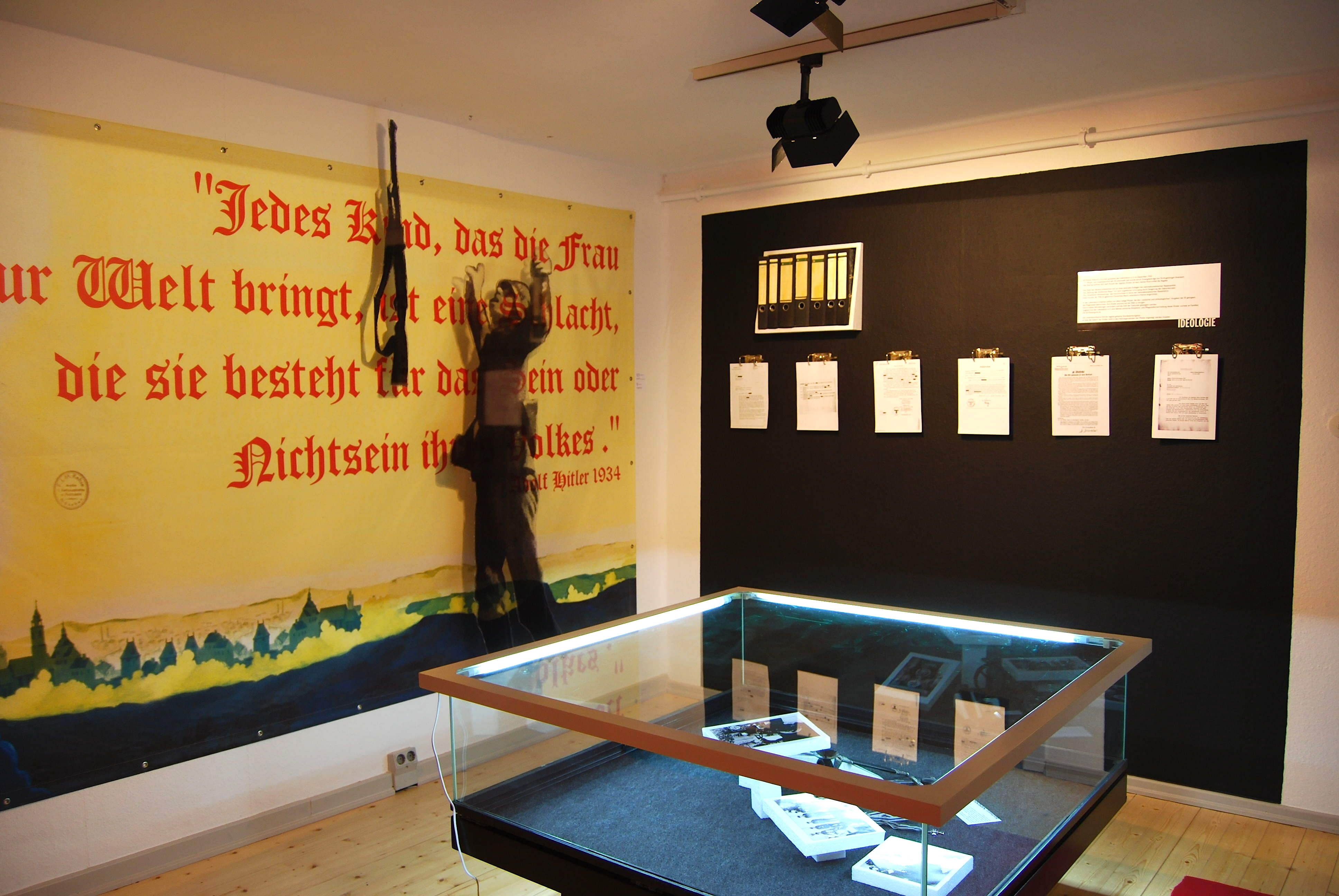 Teil des Ausstellungsbereichs zum Thema "Lebensborn" in der Gedenkstätte Baracke Wilhelmine in Schwanewede-Neuenkirchen in Niedersachsen/Deutschland.